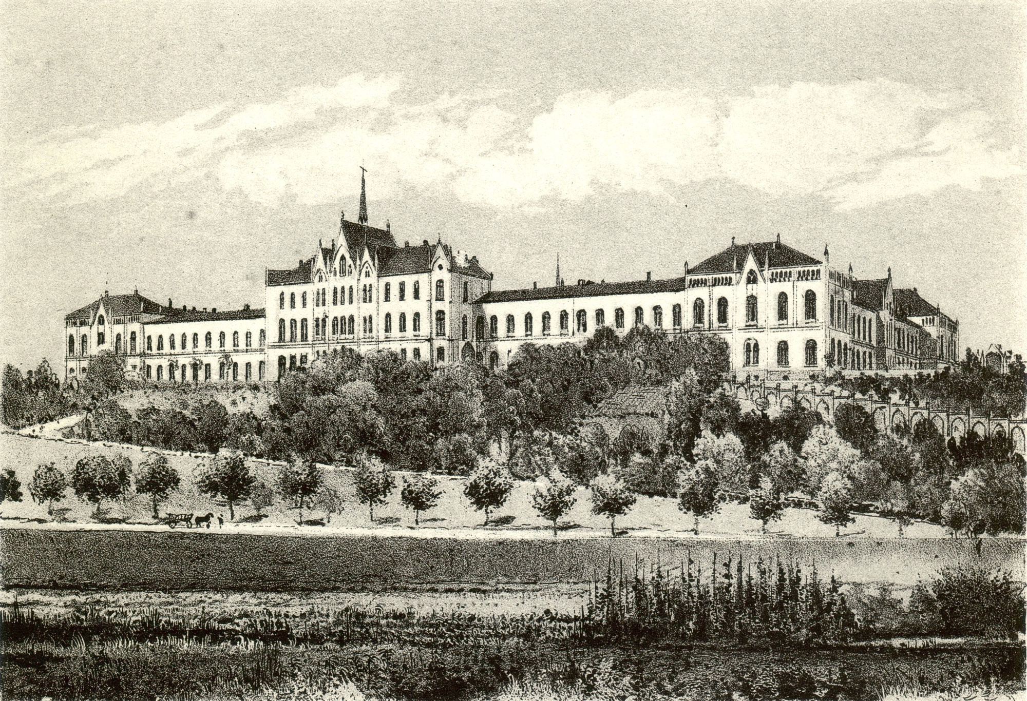 Lithographie des späteren Landeskrankenhauses Göttingen, damals Irrenanstalt zu Göttingen, heute Asklepios Fachklinikum Göttingen. Im Vordergrund der Fluss Leine.